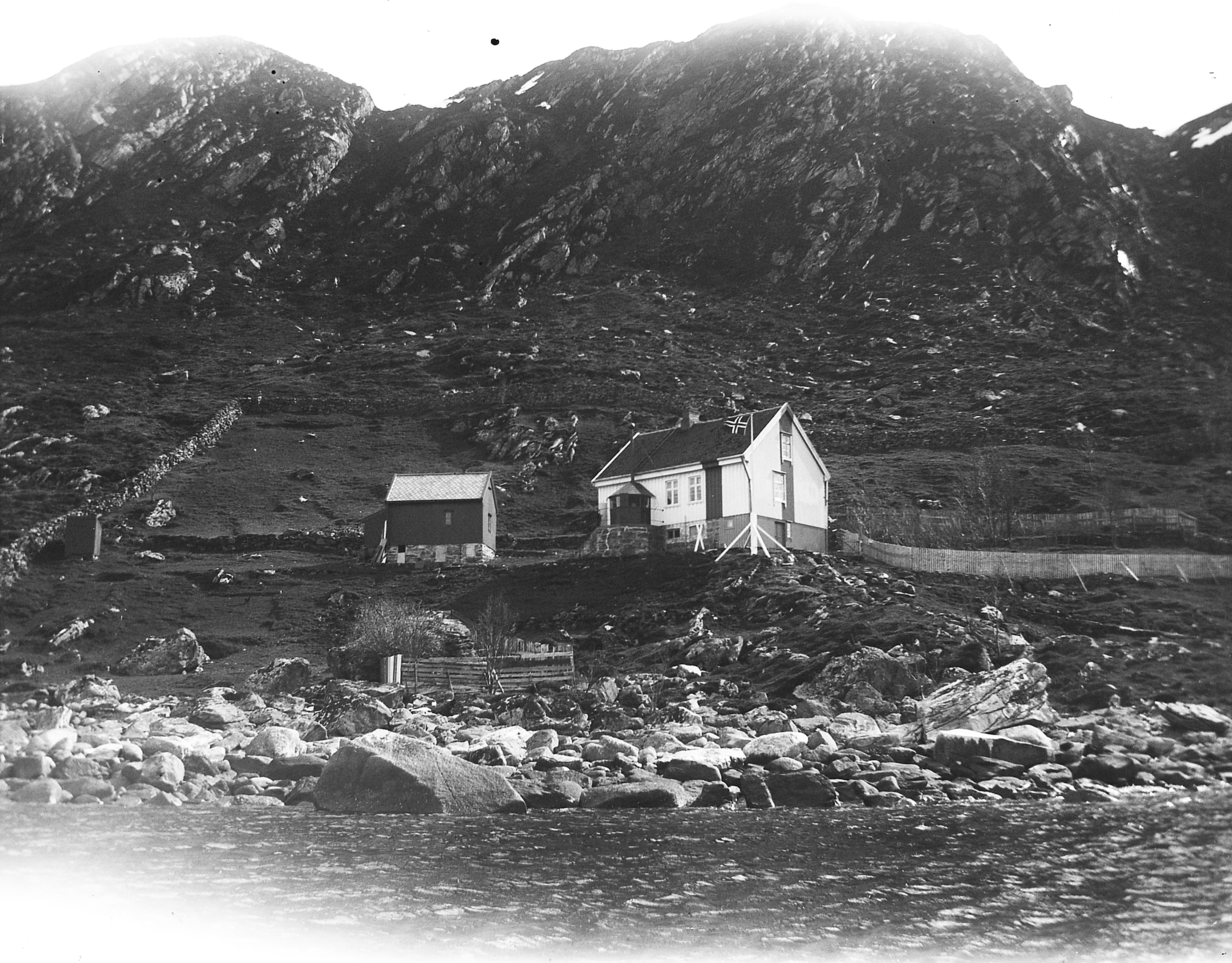 Bildet er hentet fra Arkivverket. Ulvesund, Vågsøy Arkivinstitusjon : Riksarkivet Arkivnavn : Fyrdirektoratet Sted : Norge, Sogn og Fjordane, Vågsøy, Emneord: Fyr, Kyst Avbildet